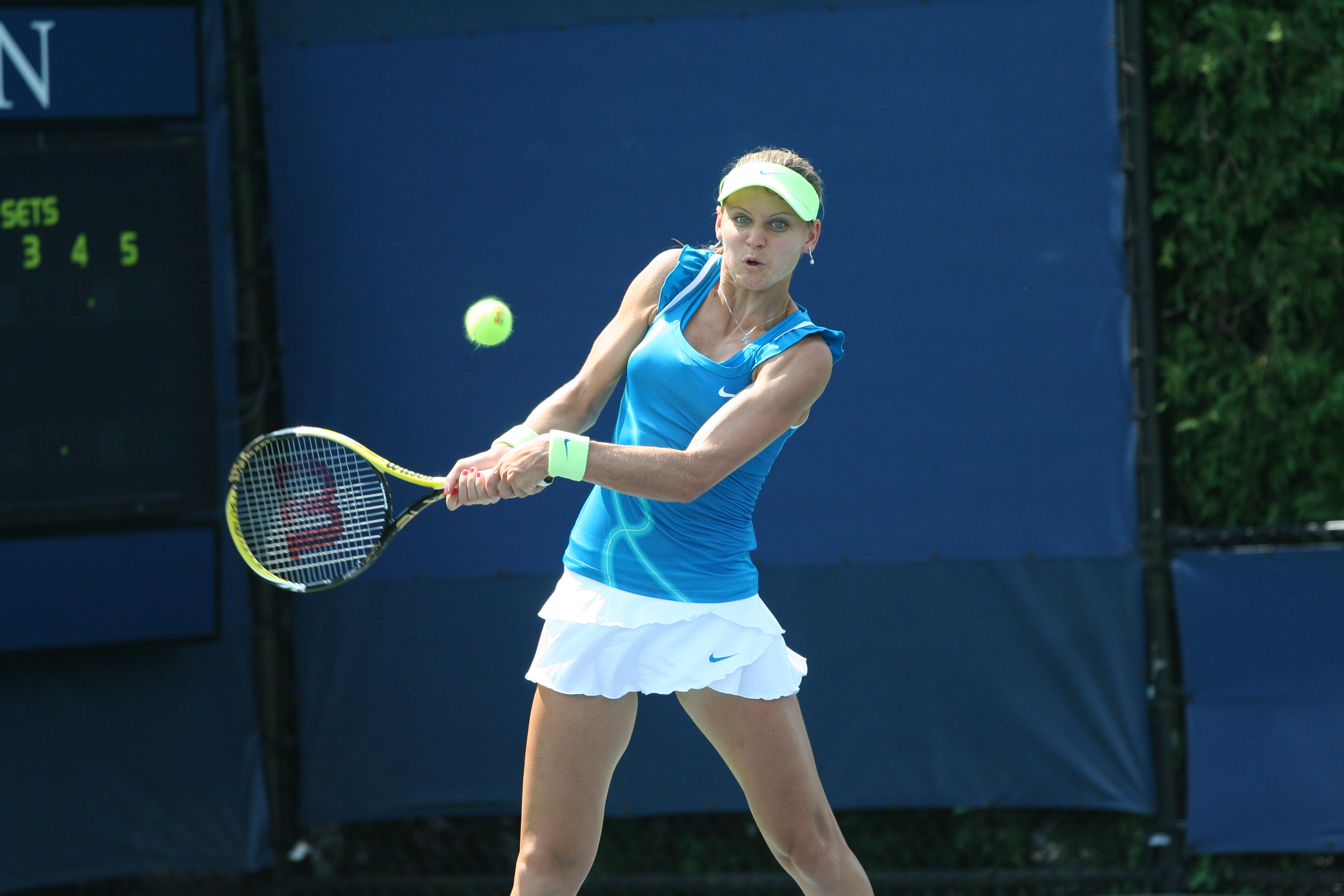 U.S. Open Sept. 1, 2010